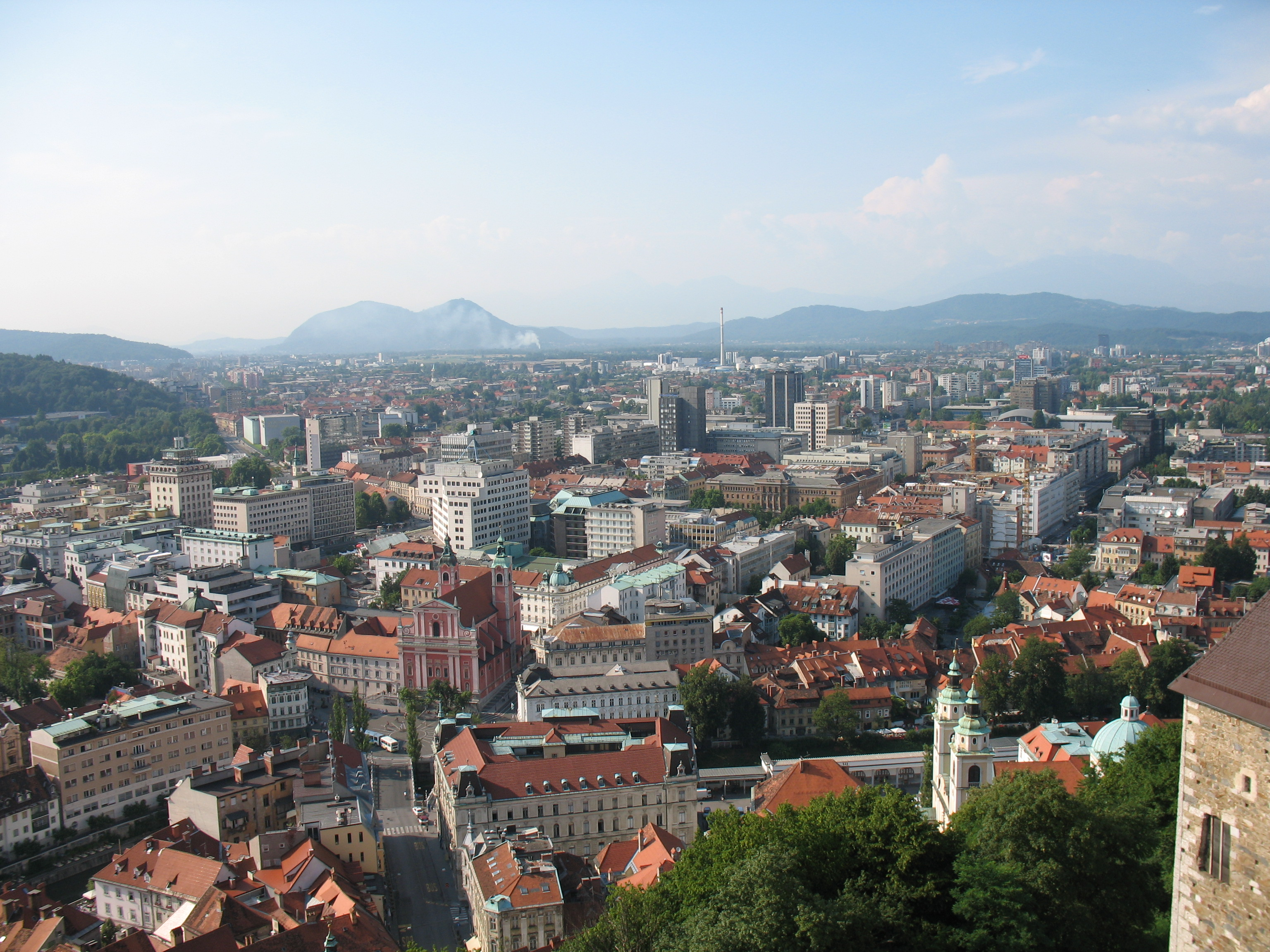 Downtown Ljubljana, Slovenia. Seen from the Ljubljana Castle.